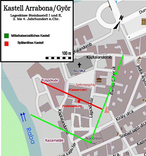 Lage- und Befundskizze der römischen Kastelle von Arrabona/Györ, 2. bis 4. Jahrhundert n.Chr.